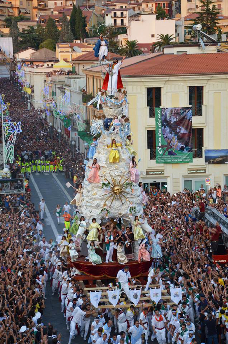 la Varia di Palmi 2013 in transito nella piazza I maggio